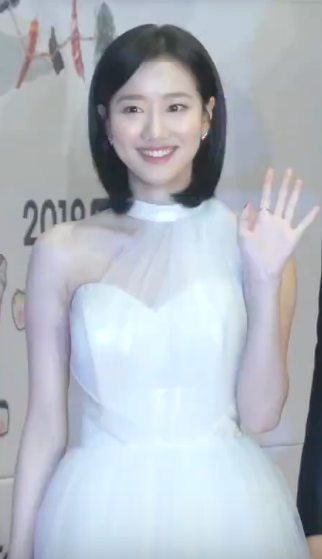 30일 오후 서울시 마포구 상암동 MBC 미디어센터에서 ‘2019 MBC 연기대상’ 시상식이 열려 식전 행사로 MBC 수목드라마 ‘어쩌다 발견한 하루’ 김혜윤, 로운, 이재욱, 이나은, 이태리, 정건주 가 참석해 포토타임을 갖고 있다.